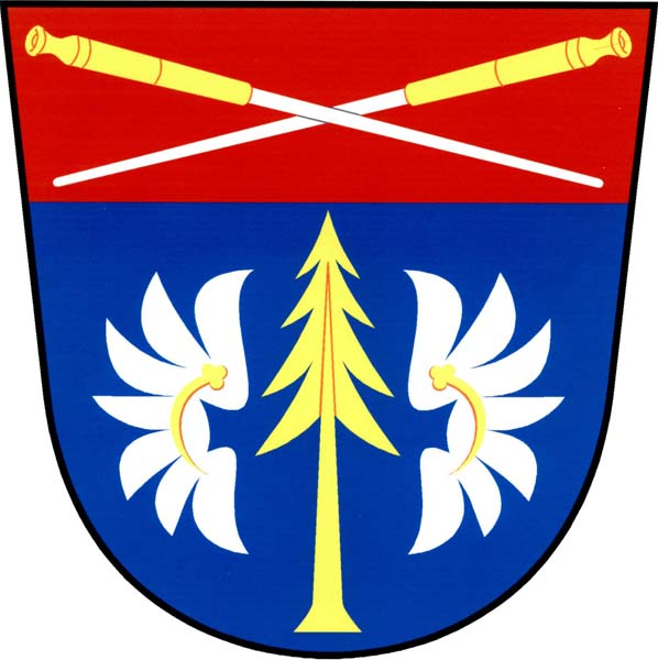 Znak obce Druhanov